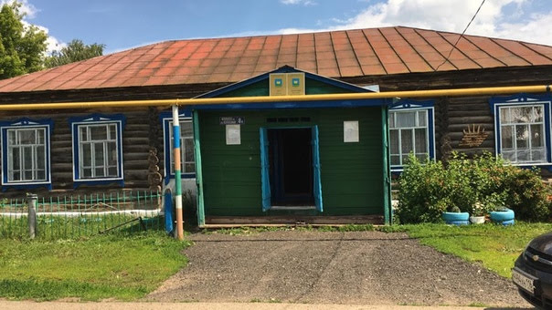 Дом культуры